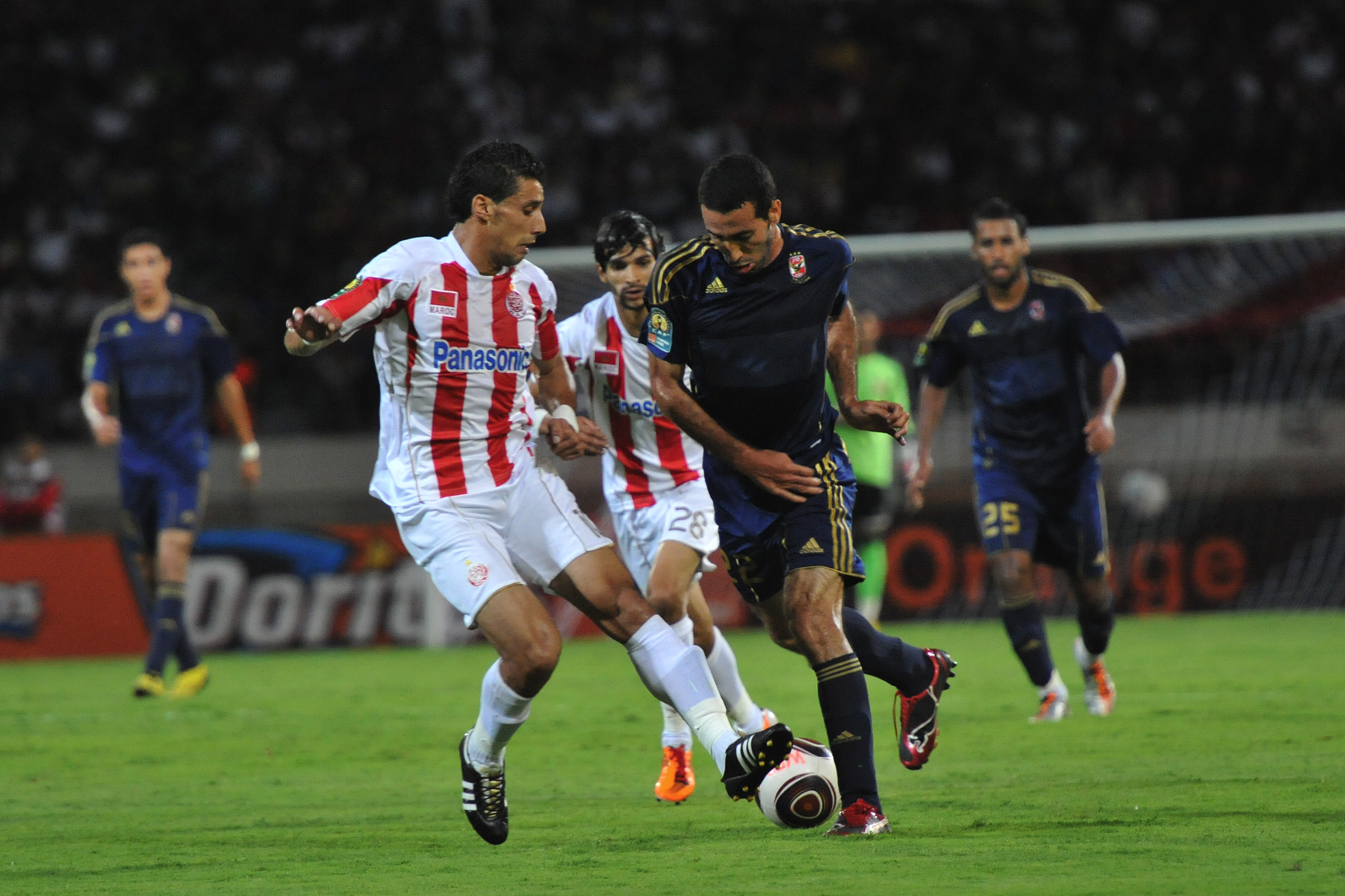 Match Wydad vs Al Ahly